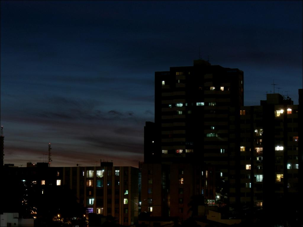 Pituba e nem tanto além a noite, Salvador, Bahia, Brasil.